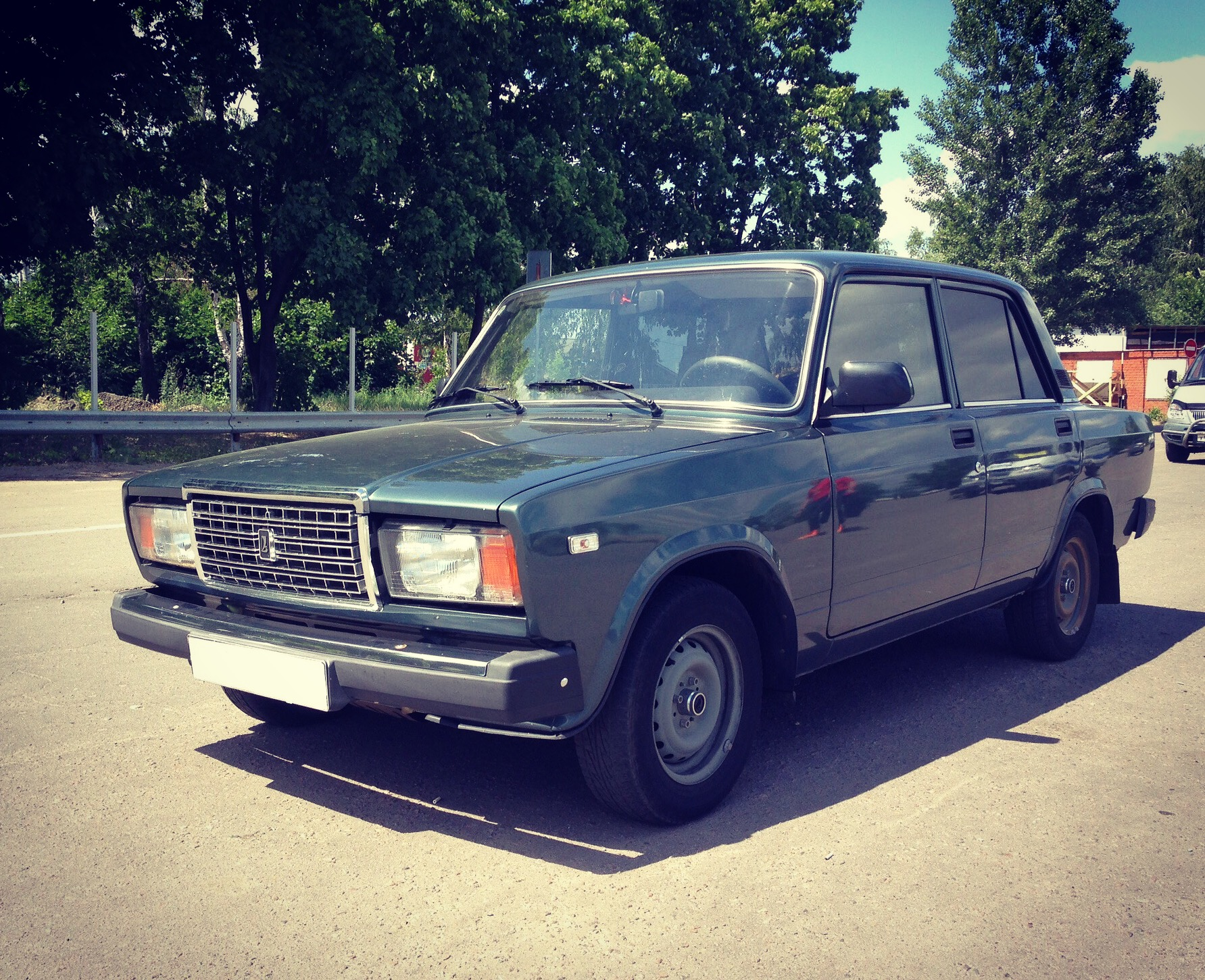 Vaz 2107